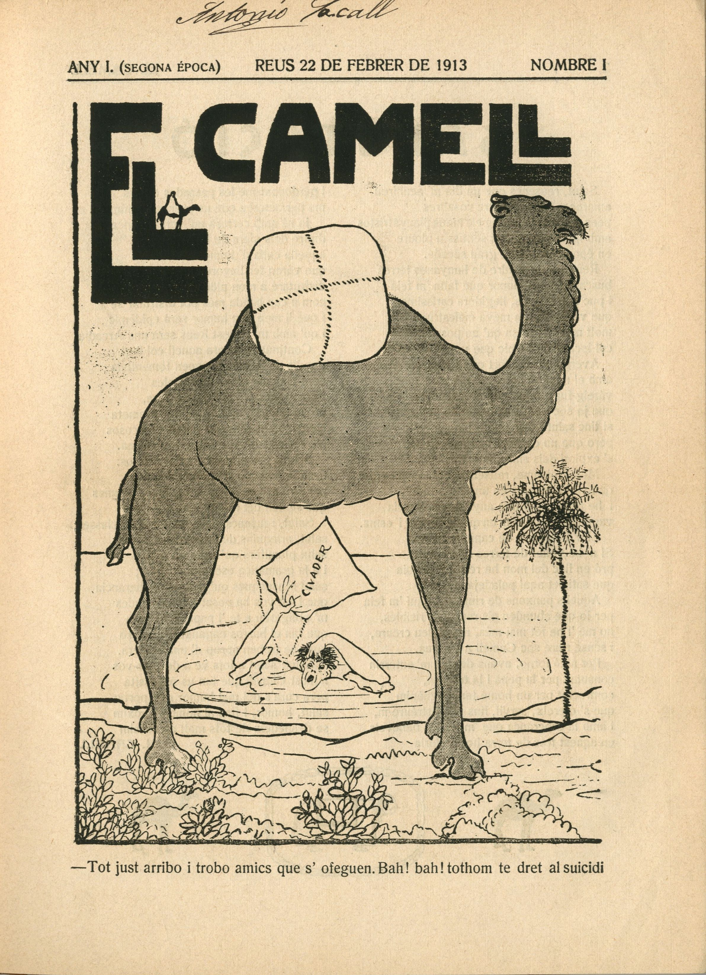 Primera pàgina de El Camell (segona època)